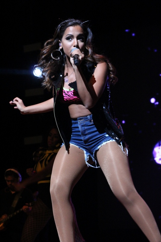 52 - Anitta (52)